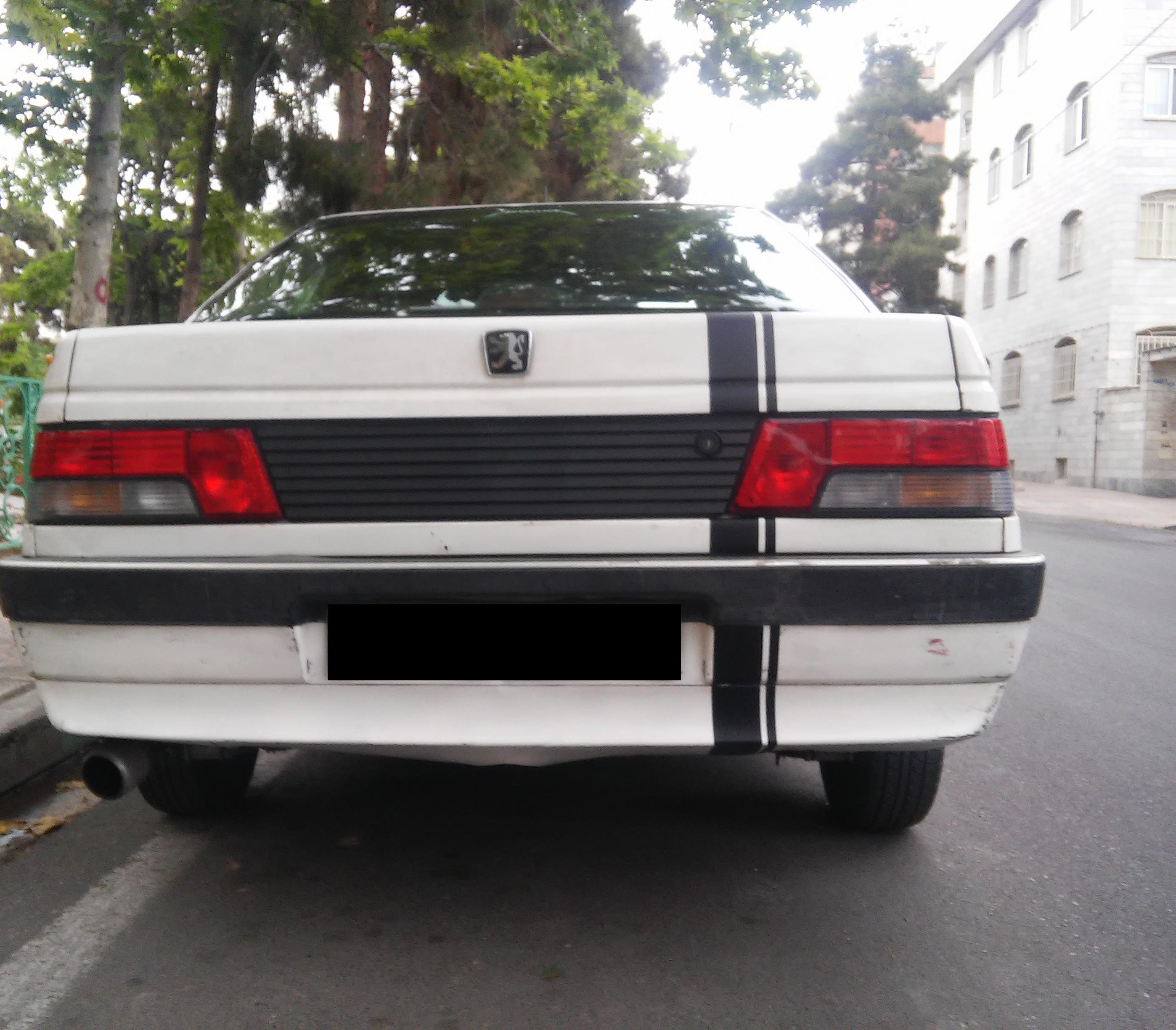 پژو آردی از نمای پشت